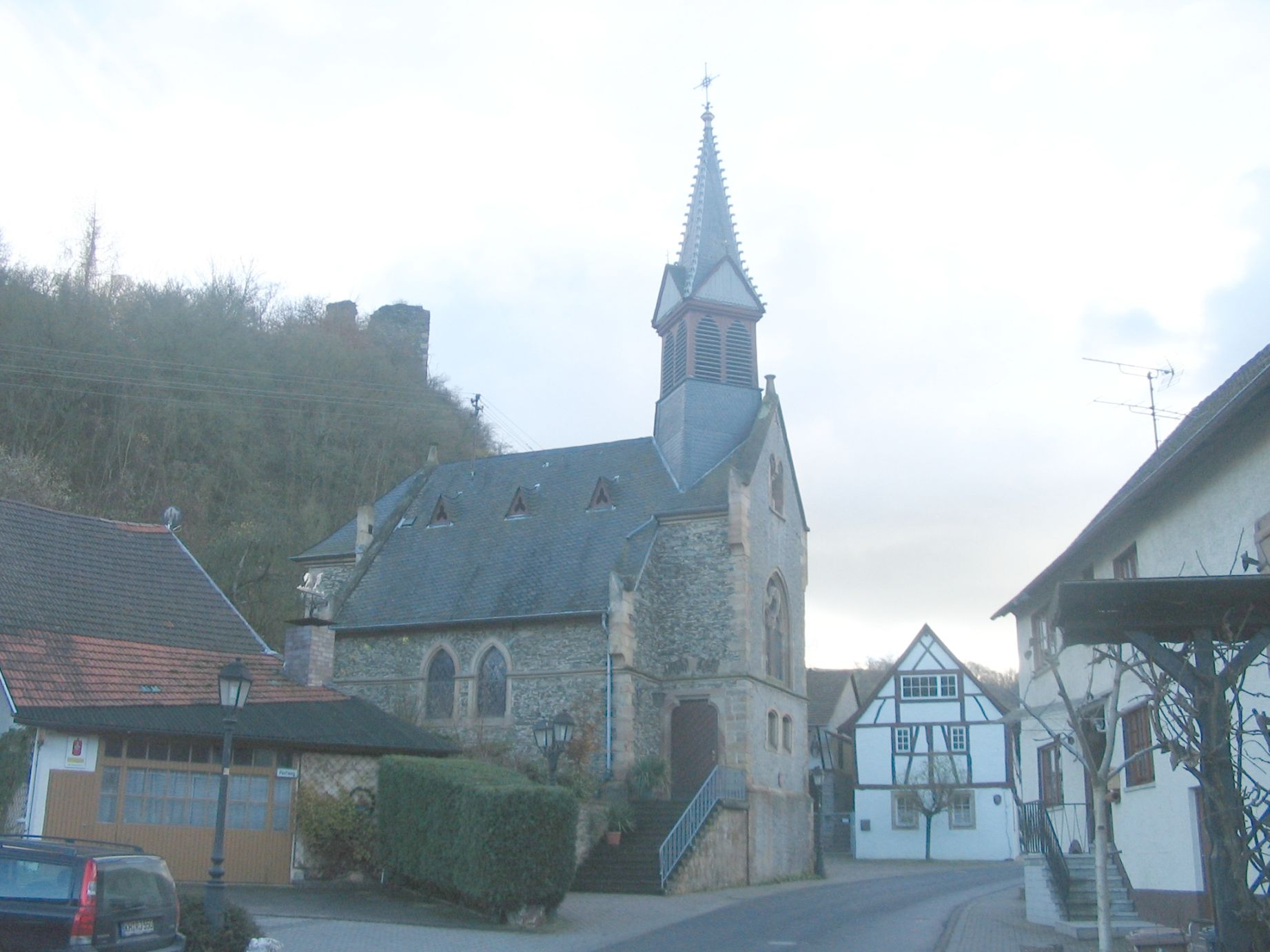 Argenschwang im südlichen Hunsrück